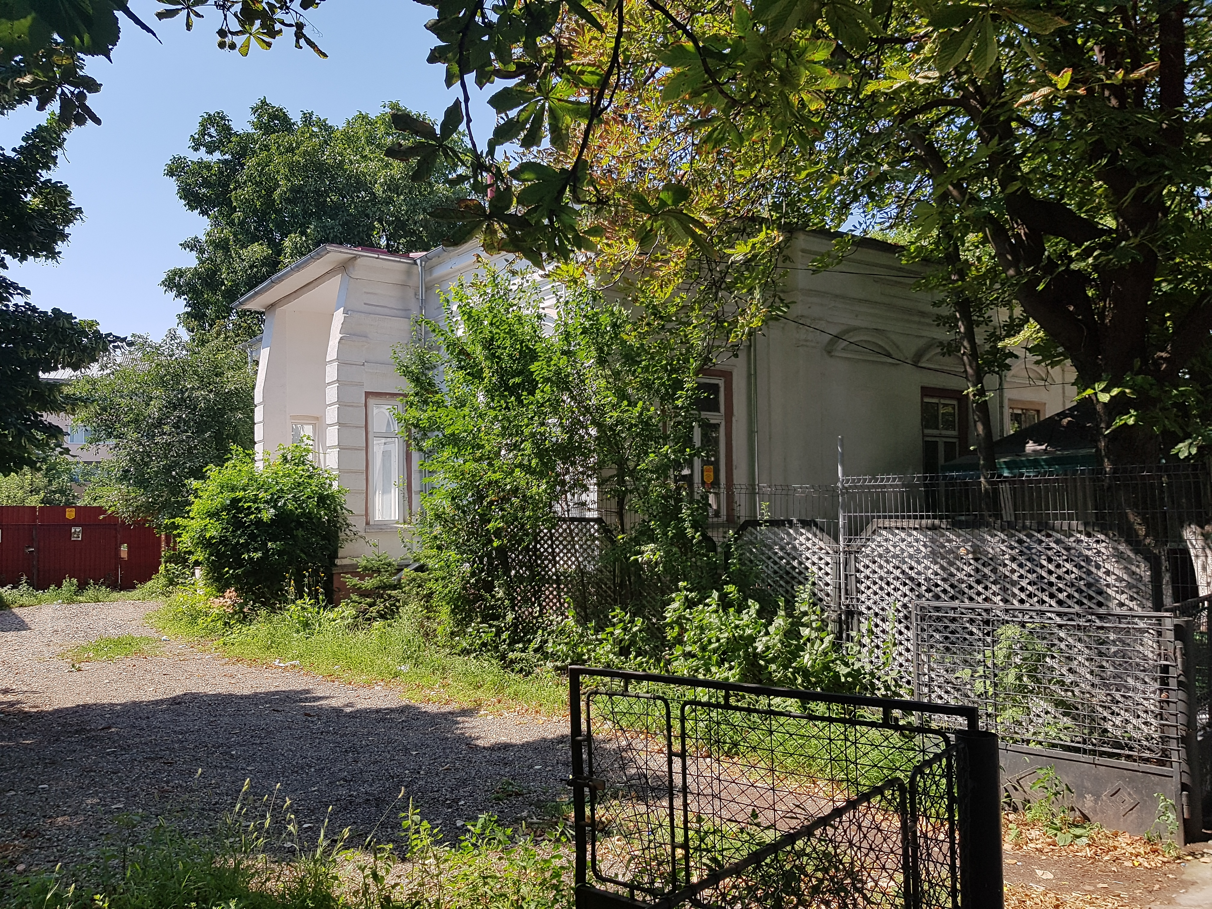 Casa Honig Moritz - Georgescu